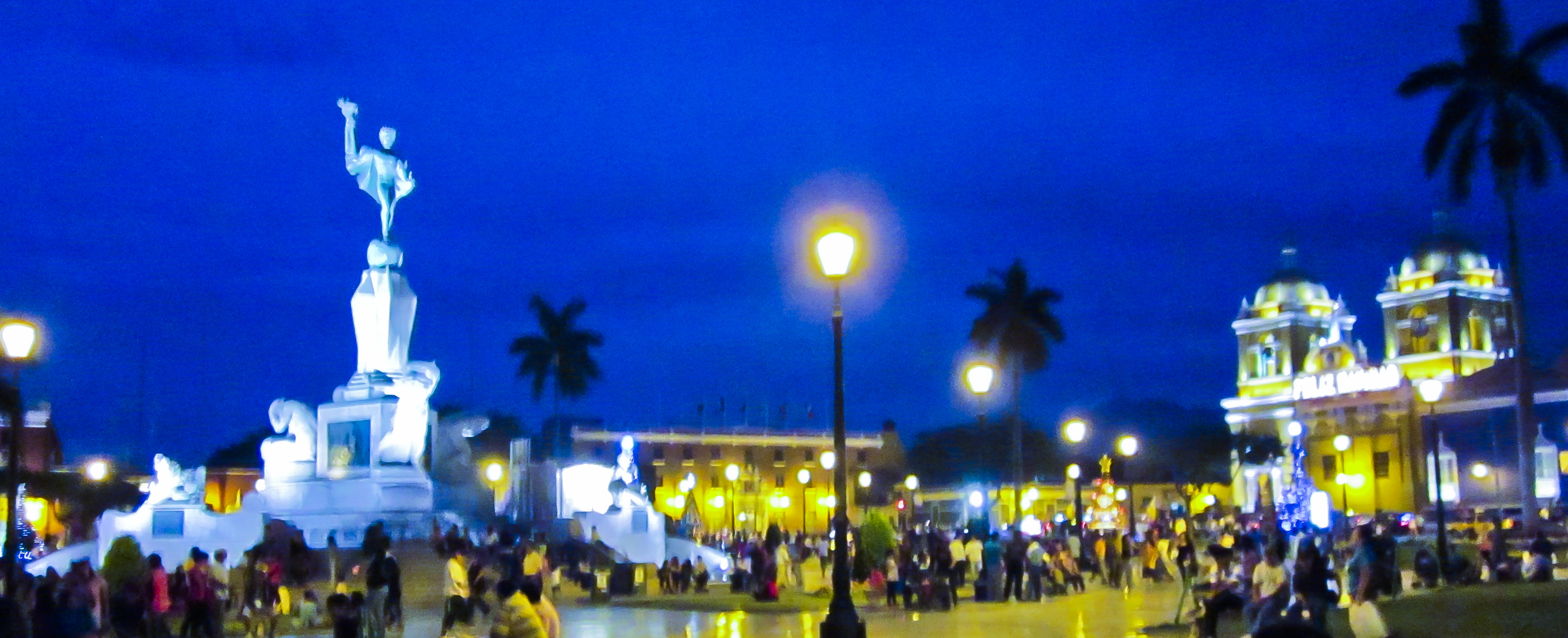 Plaza de armas de la capital de La Libertad, Trujillo (Perú), en el centro el Monumento a la Libertad, por el escultor Edmund Moeller